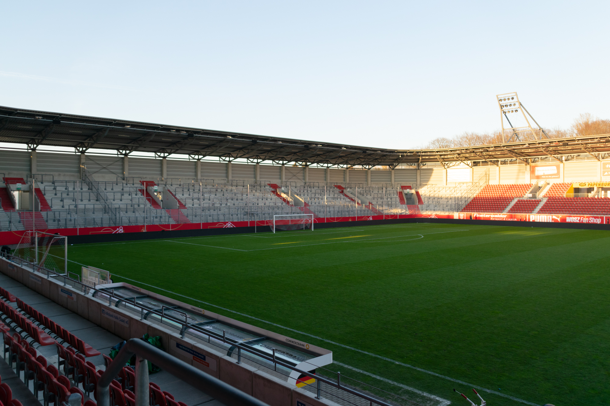 Erdgas Sportpark in Halle (Saale)